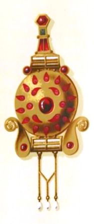 Reconstituire a fibulei micii făcută de Alexandru Odobescu, adică, cum arăta ea nedeteriorată